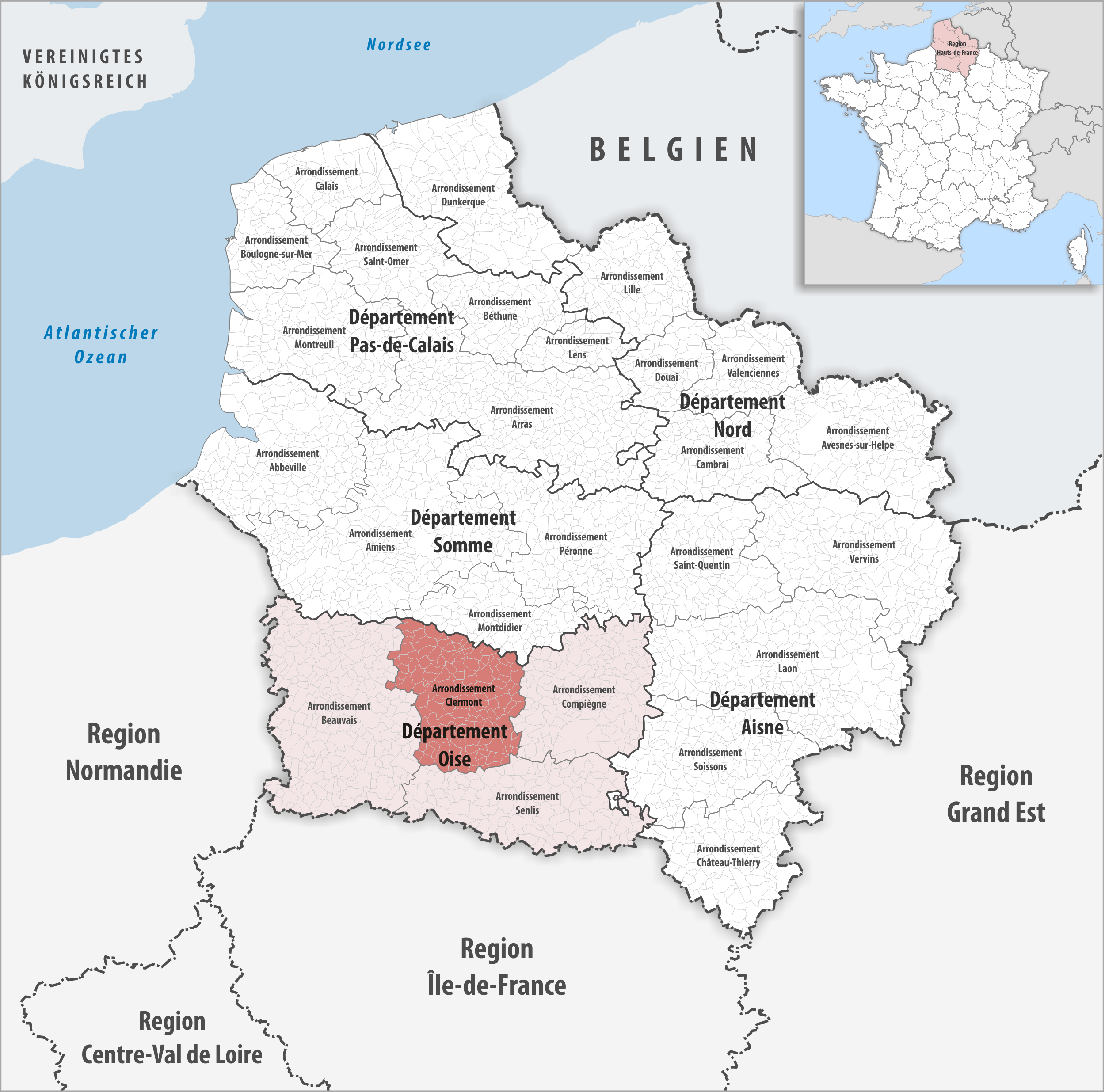 Lage des Arrondissements Clermont